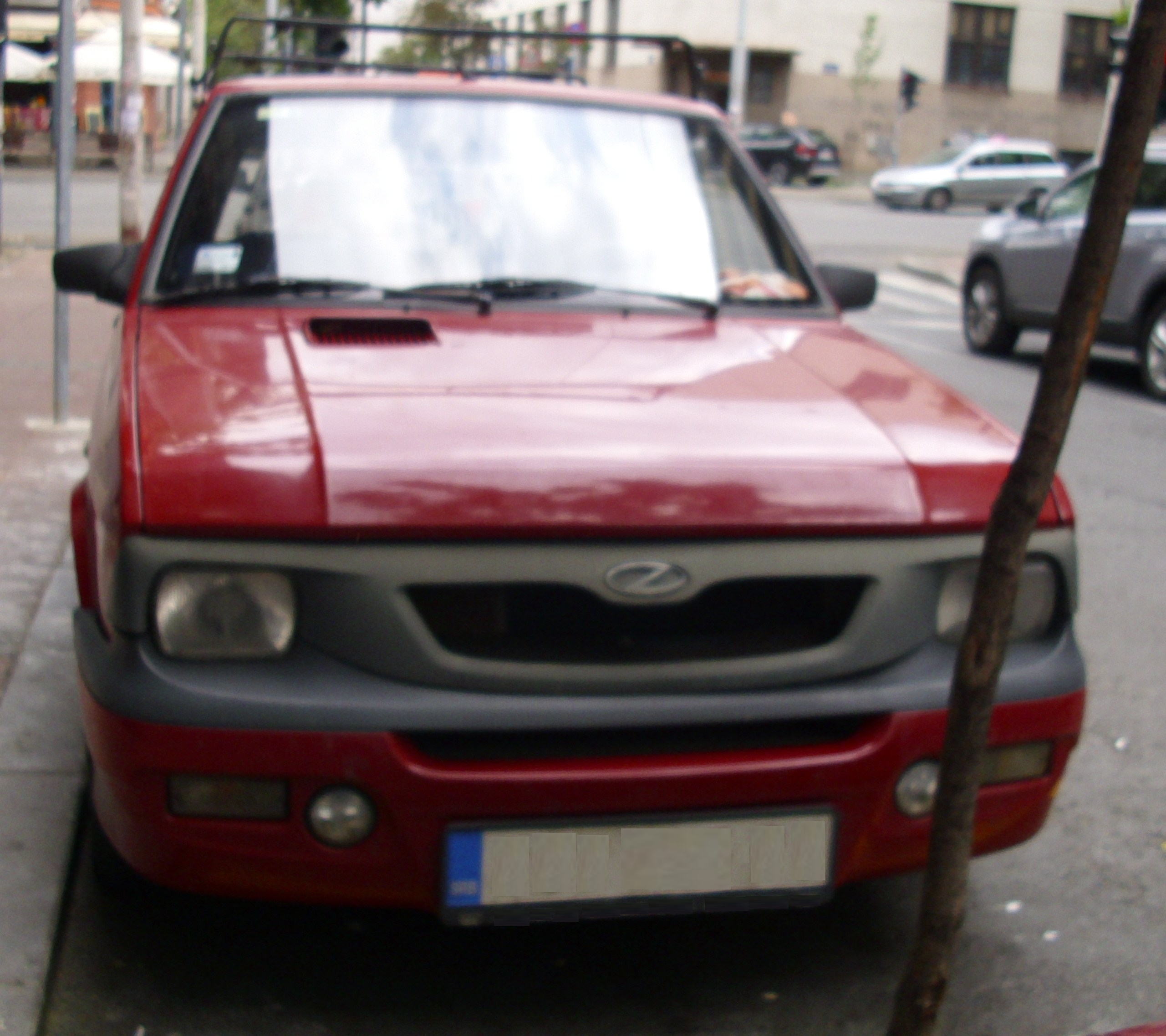 Zastava Koral In